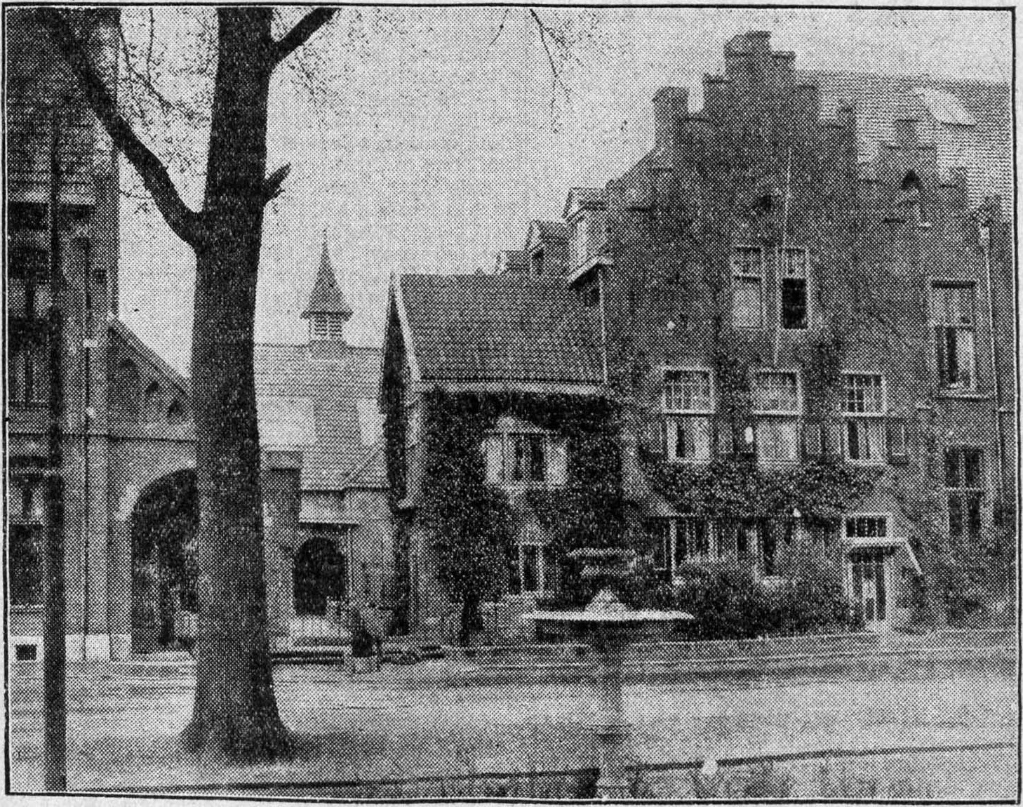 Het nieuwe museum te Roermond gereed gekomen. Afkomstig uit de Limburger Koerier, jaargang 87, nr. 113 (zaterdag 14 mei 1932): Derde blad, [p. 1].